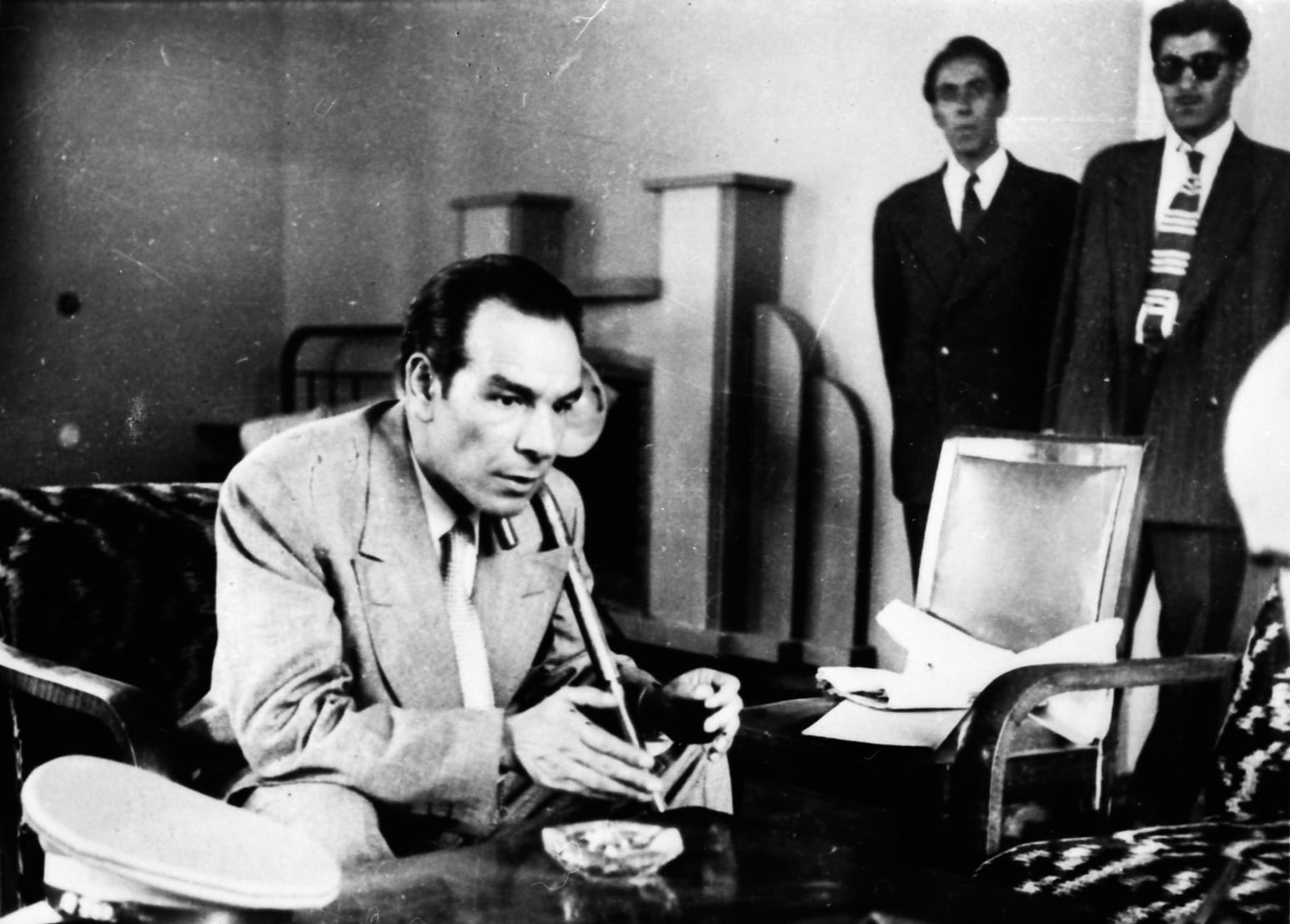 تیتر روزنامه های صبح 25 مرداد: "کودتا شکست خورد... ما جمهوری می خواهیم". در ساعت 9 صبح، شاه با هواپیما به بغداد رفت. در ساعت 2 بعد از ظهر، رادیو تهران از تمام احزاب خواست برای مذاکره در میدان مجلس (بهارستان) گرد آیند. همه مطمئن بودند که شاه کشور را ترک کرده و جمهوری برپا خواهد شد. %85 این جمعیت، از اعضای حزب توده بودند.